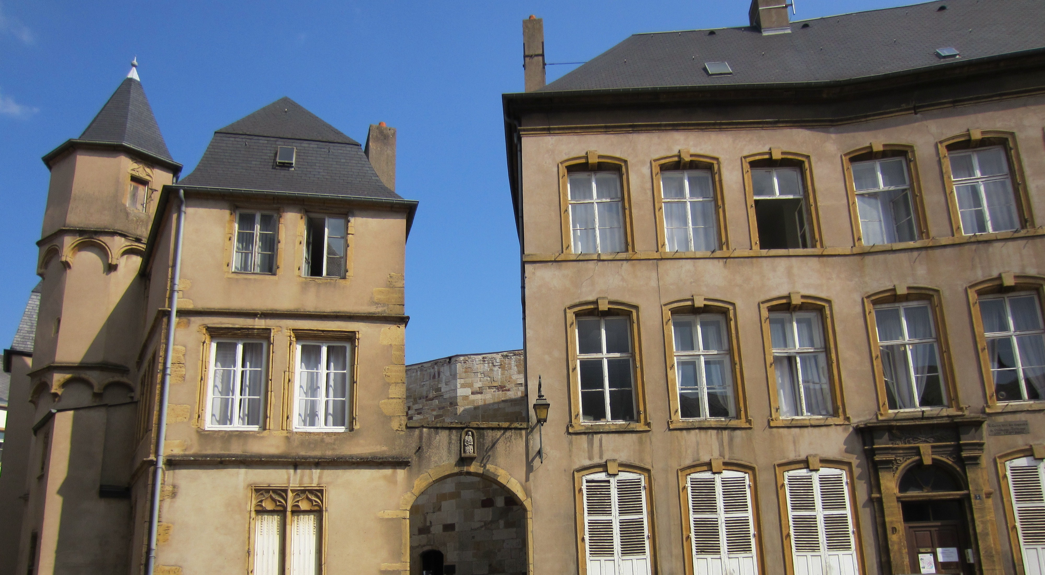 Description Ancien hôtel des Créhange-Pittange (voir [1]) Date26 August 2011Sourcemon appareil photoAuthorAimelaimePermission (Reusing this file) Ancien hôtel des Créhange-Pittange (voir [1])